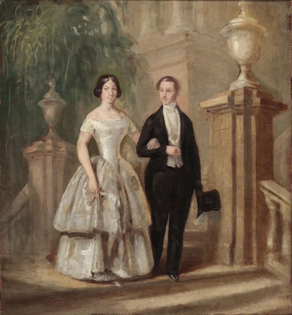 Esta obra es un boceto preparatorio a escala reducida para un retrato conjunto de Isabel II de España (1830-1904) y de su esposo, el rey Francisco de Asís de Borbón (1822-1902), que fueron los padres de Alfonso XII.